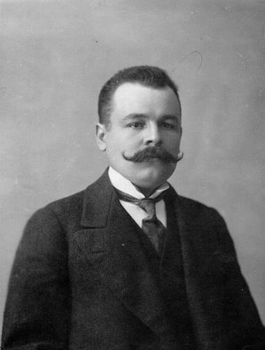 Депутат Государственной Думы 4-го созыва от Петербургской губернии А.Е.Бадаев.